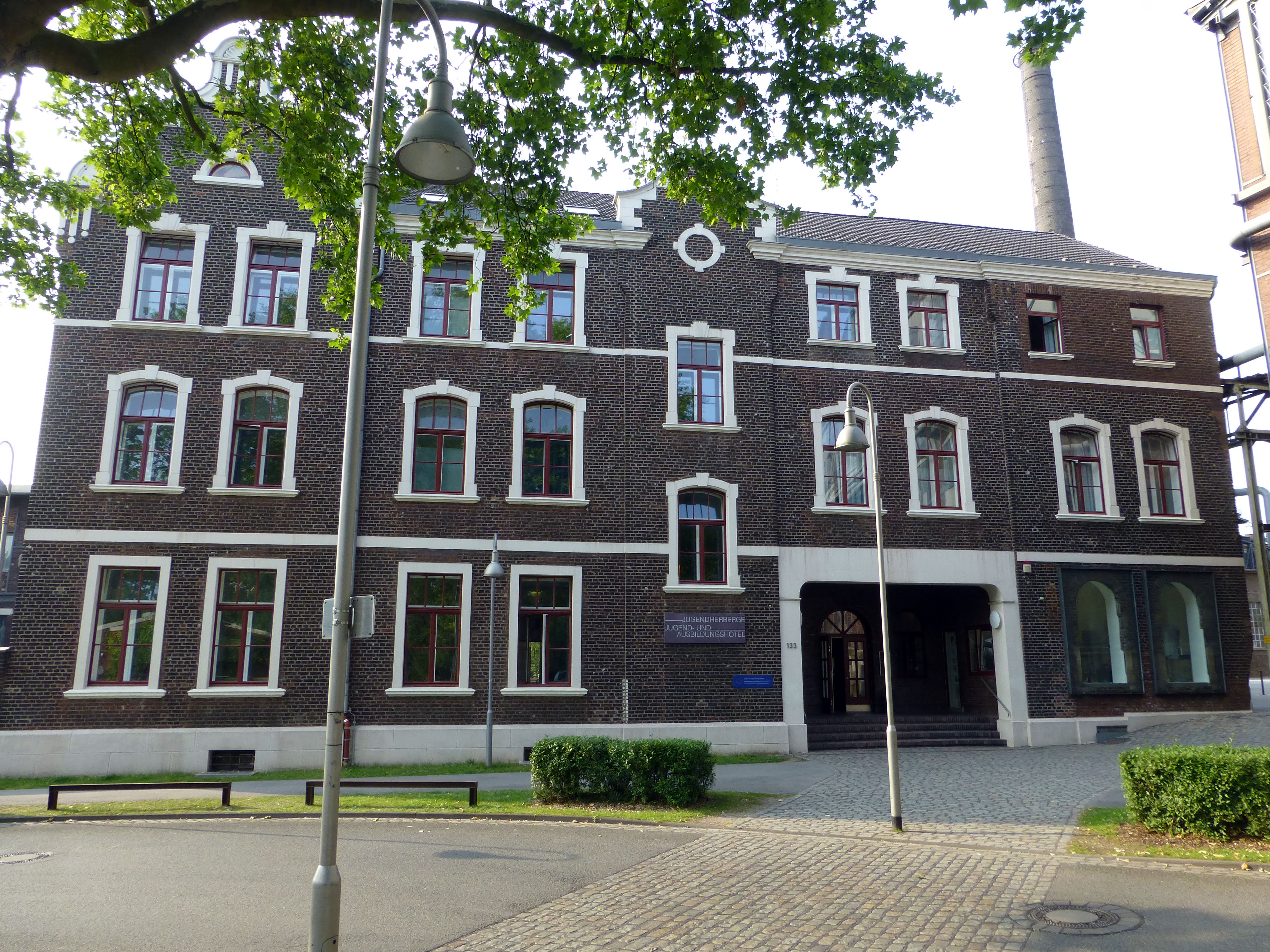 Eingang der Jugendherberge im Landschaftspark Duisburg-Nord